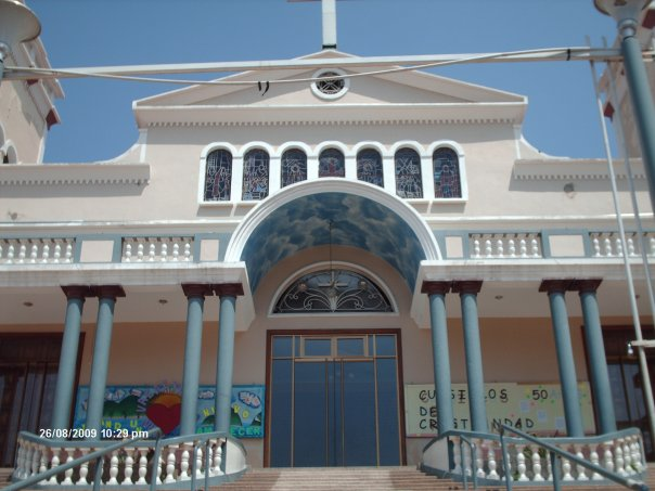 Guanta, estado Anzoátegui - Venezuela